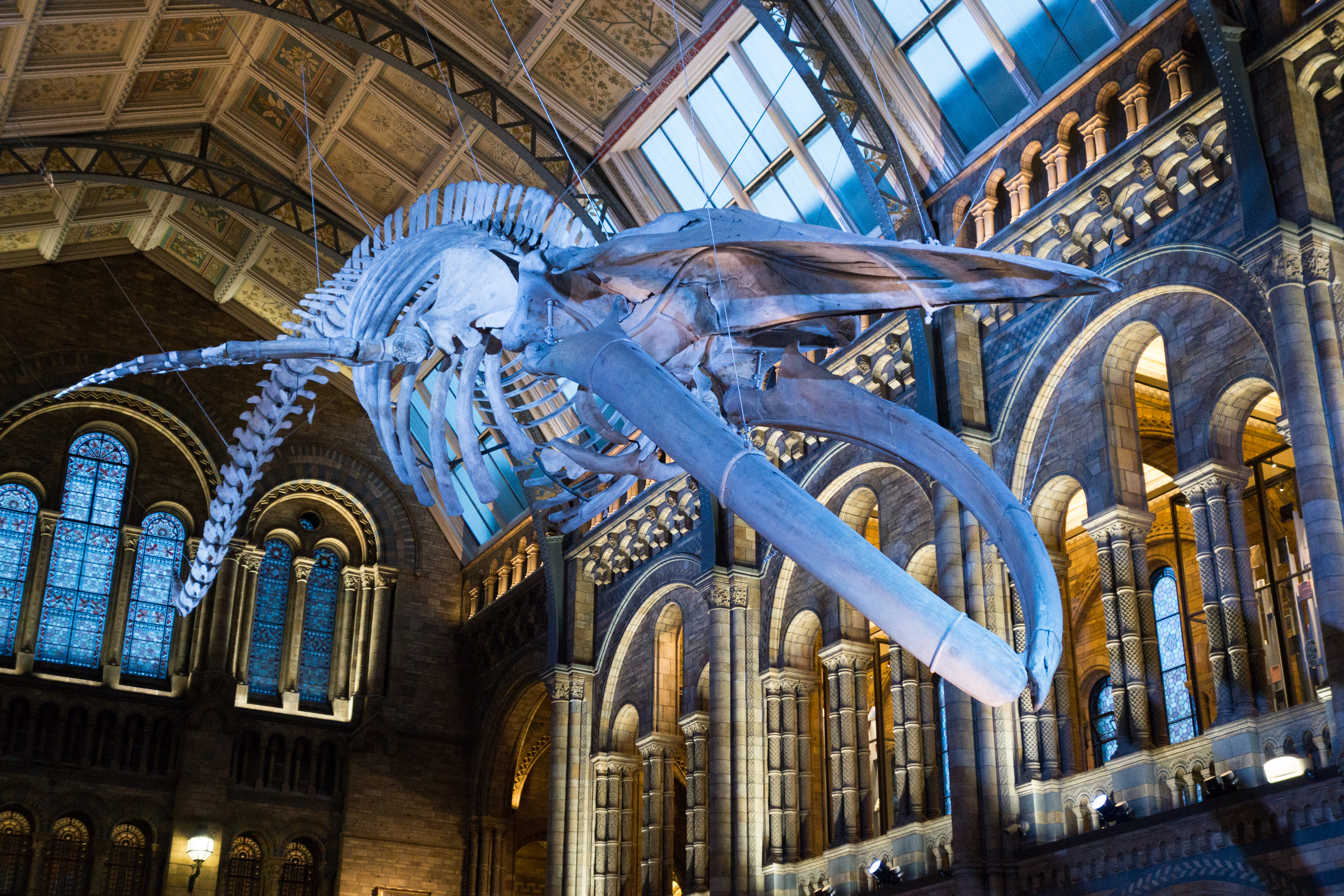 London, 2017